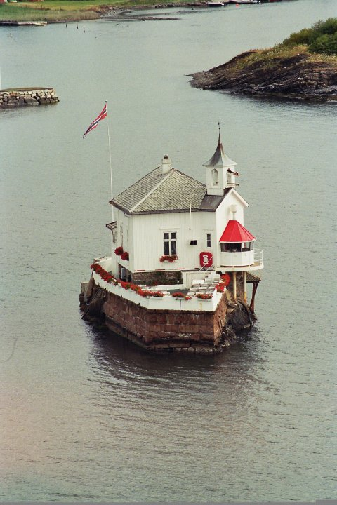 Leuchtturminsel/Leuchtturm auf Insel im Hafen von Oslo/Norwegen (Original text: Dyna Fyr im Hafen von Oslo/Norwegen, vormals Leuchtturn, heutzutage automatisiert und als Restaurant benutzt.) Andere Versionen: keine